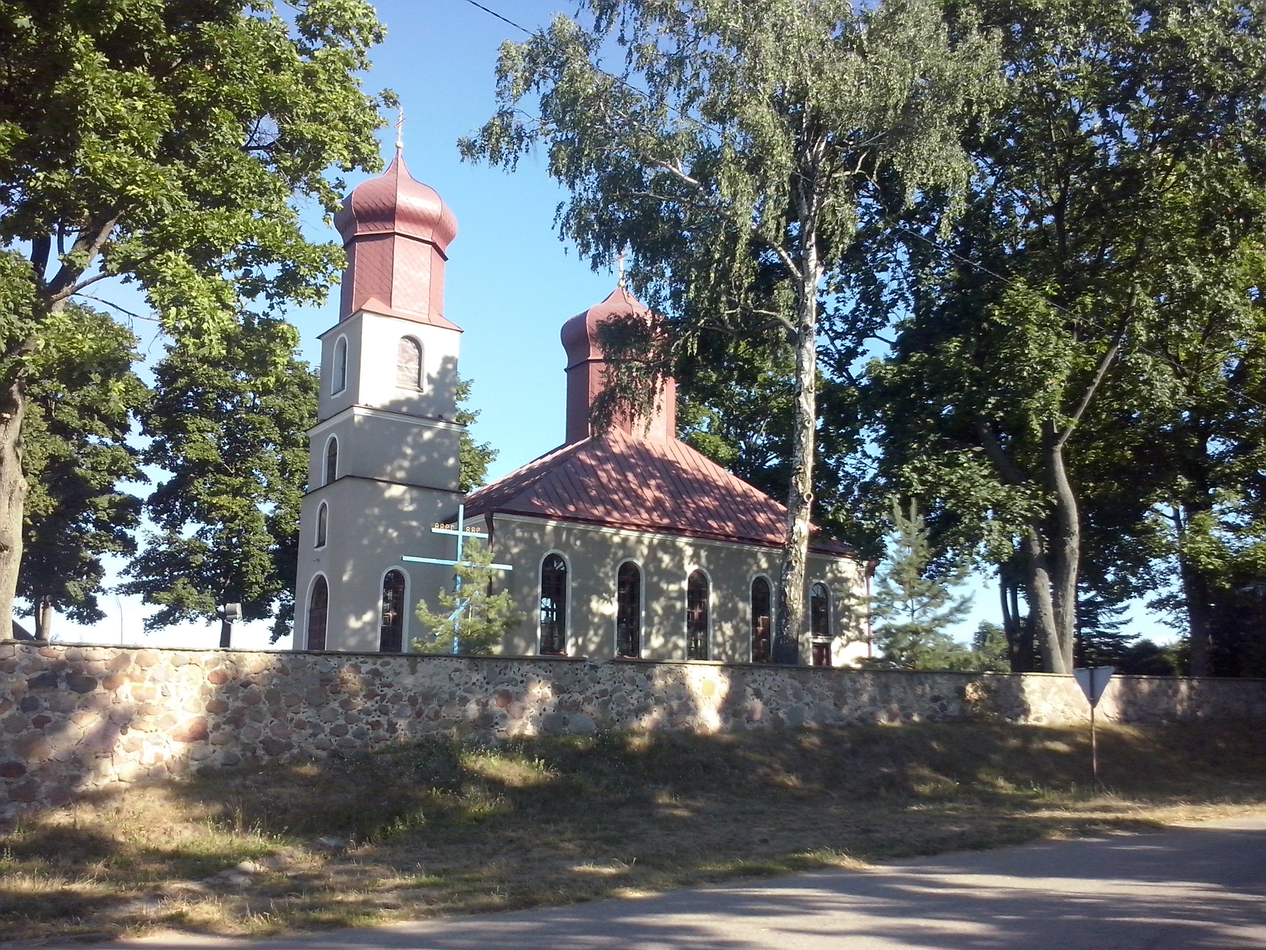 Nowy Dwór (gm. Nowy Dwór, pow. Sokółka) - cerkiew Św. Mikołaja